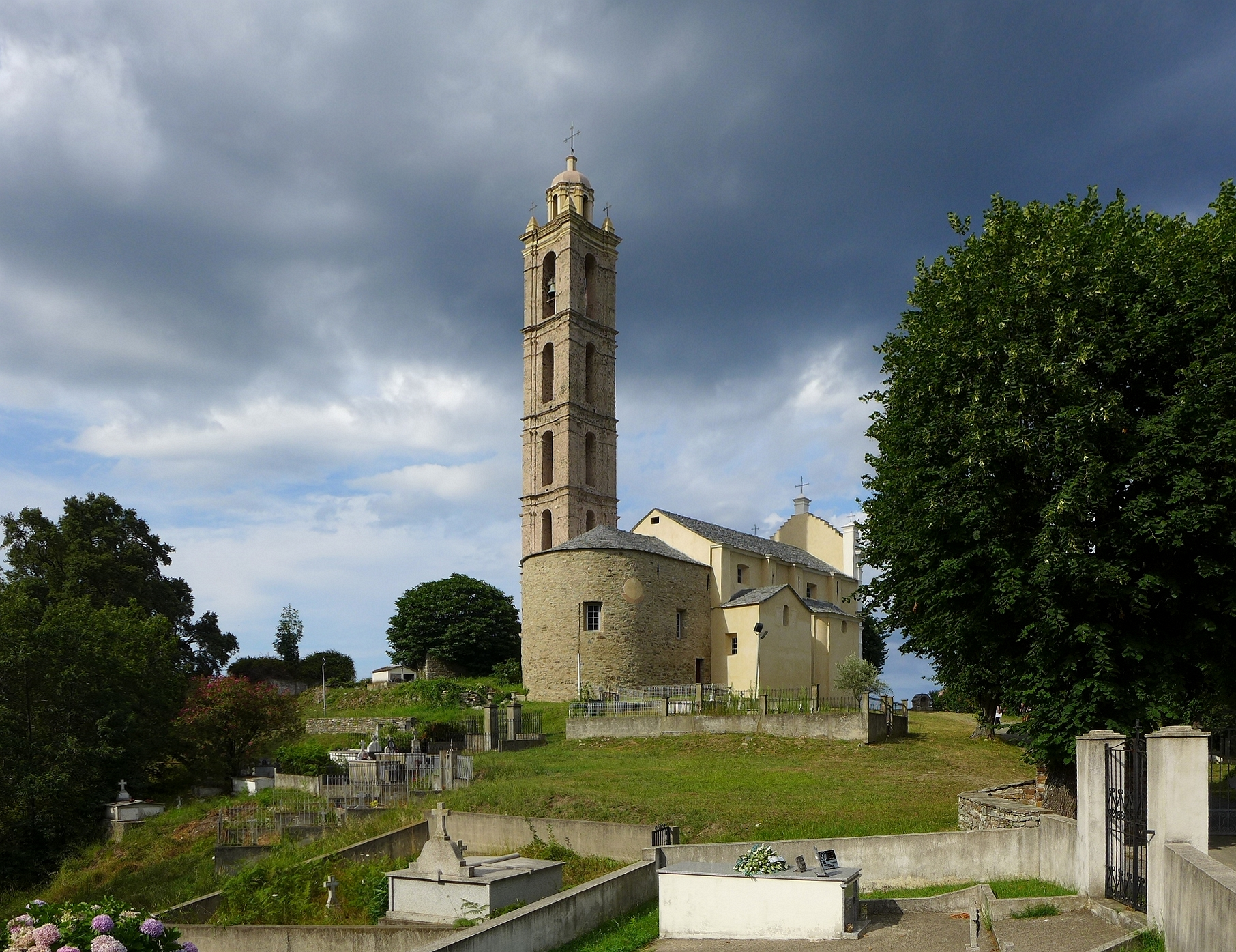 Kirche San Nicolao, San Nicolao, Haute-Corse, Korsika, Frankreich